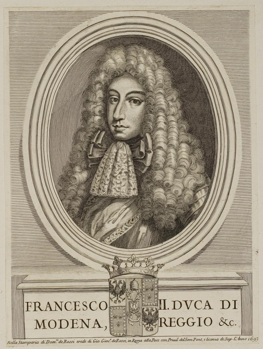 Grafik aus dem Klebeband Nr. 1 der Fürstlich Waldeckschen Hofbibliothek Arolsen Motiv: Francesco II. Herzog von Modena und Reggio